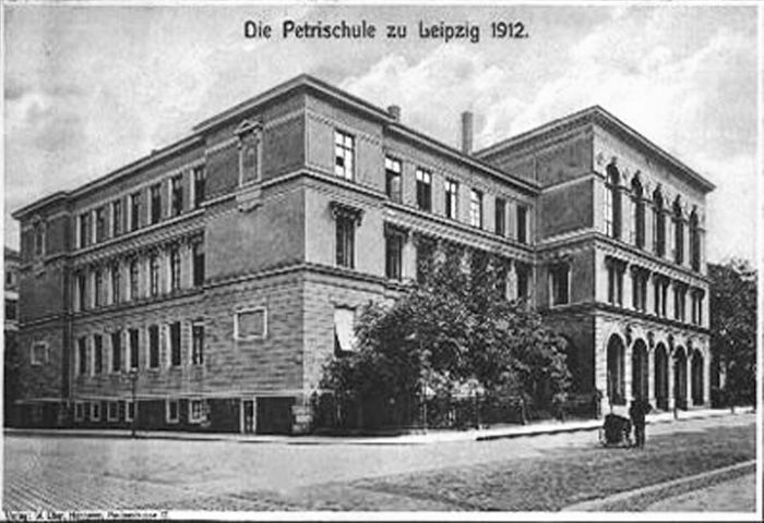 Die Petrischule in Leipzig im Jahr 1912